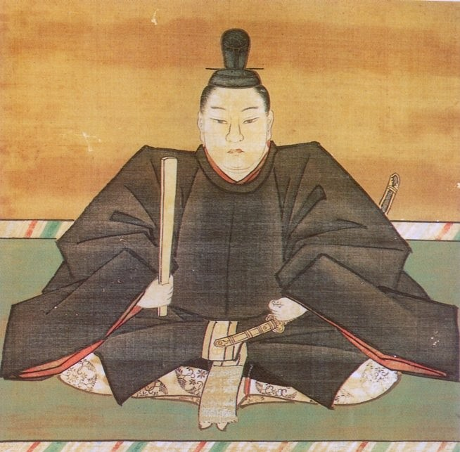 島津義弘。Shimazu Yoshihiro.